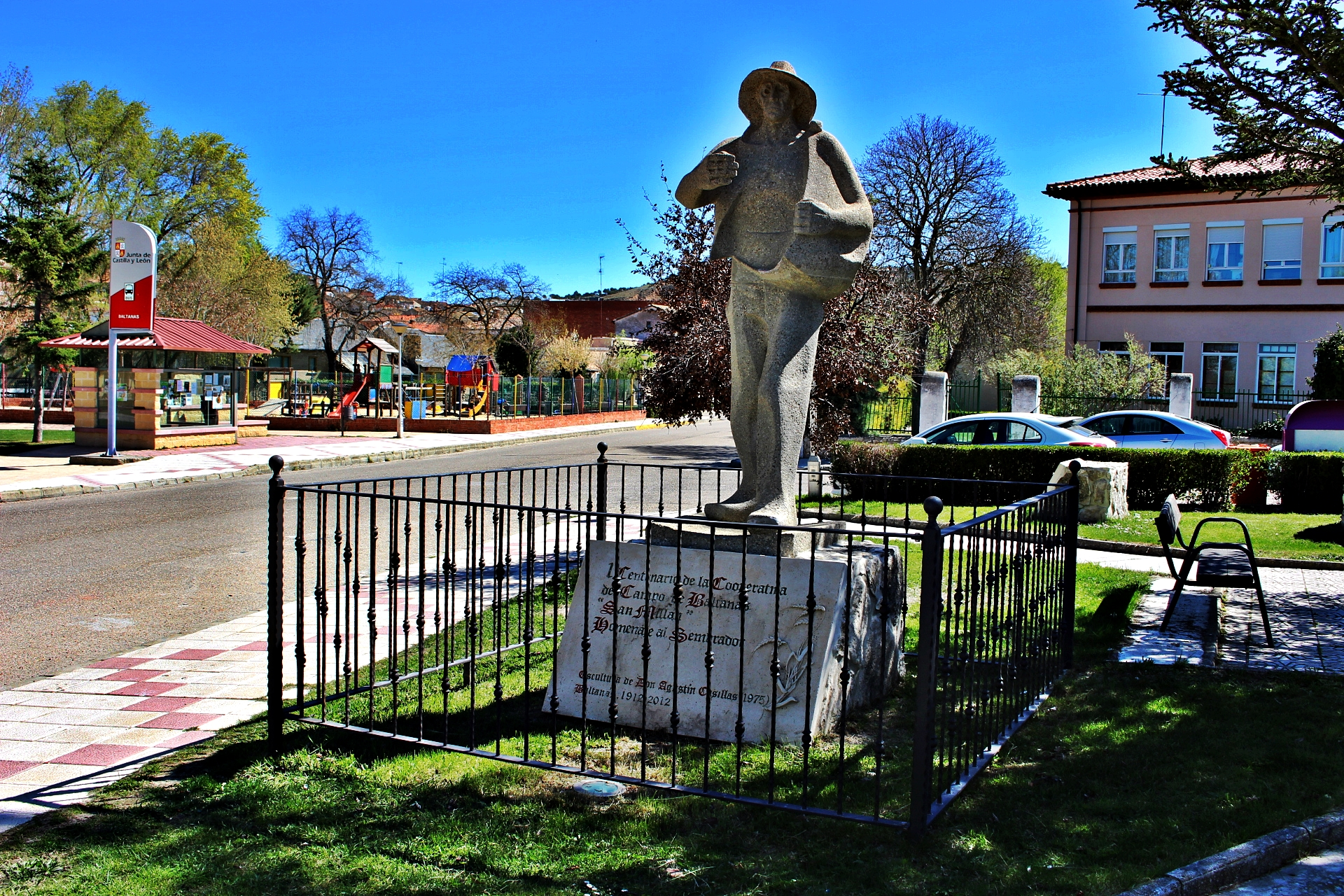 Escultura avenida en Baltanás